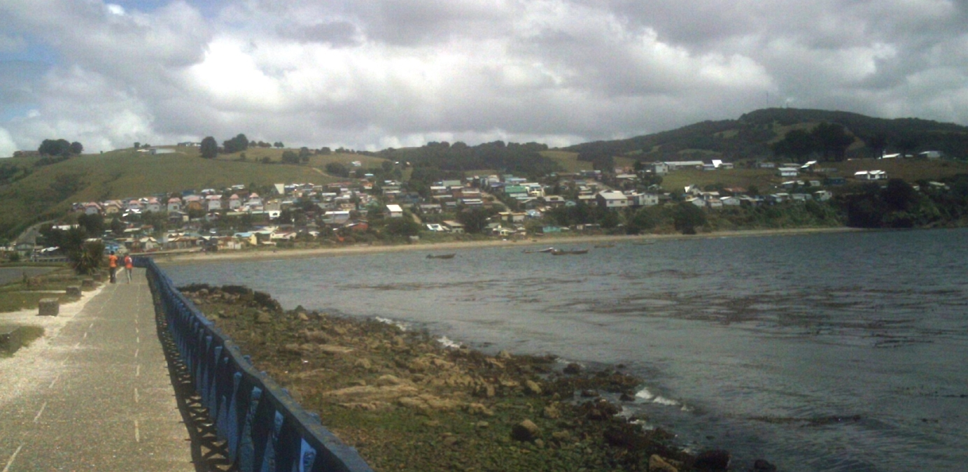 Vista parcial de Ancud, Isla Grande de Chiloé, Chile.